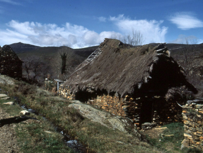 Antigua cabaña con techo de paja, abandonada y casi derruida en la localidad de Truchillas, Comarca de la Cabrera en León (España).